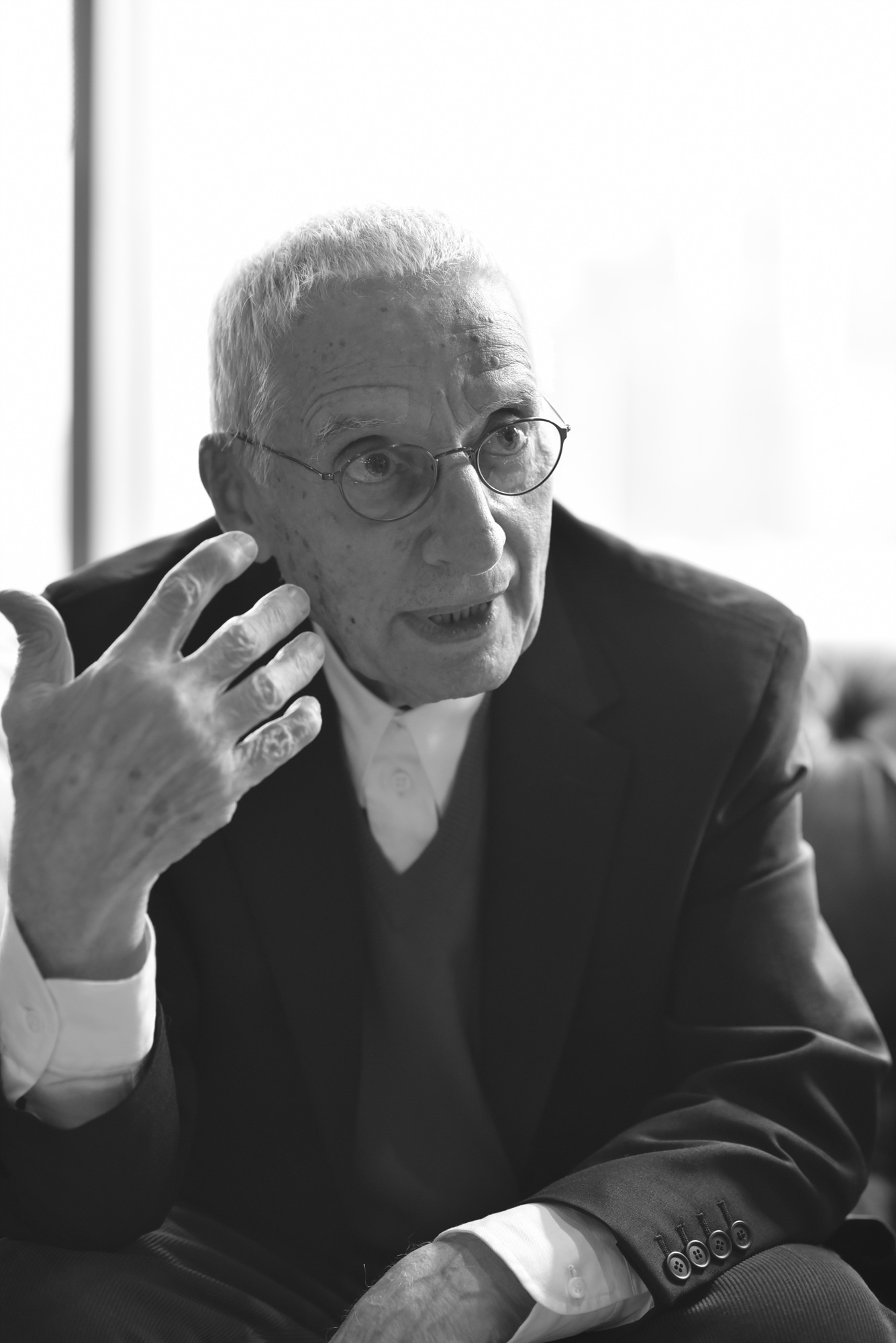 Alessandro Mendini Profile.